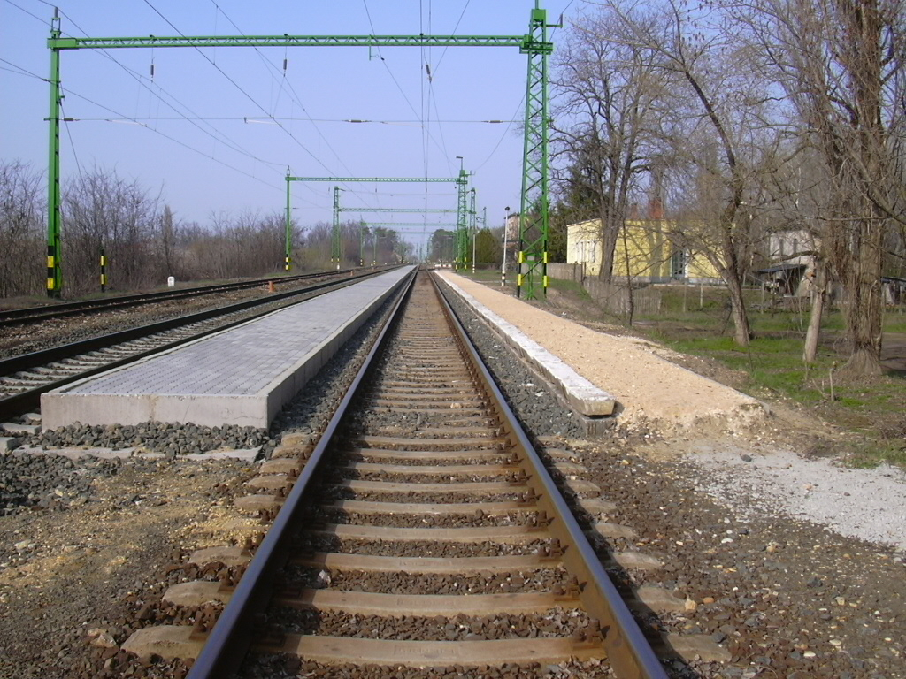 Katonatelep állomás